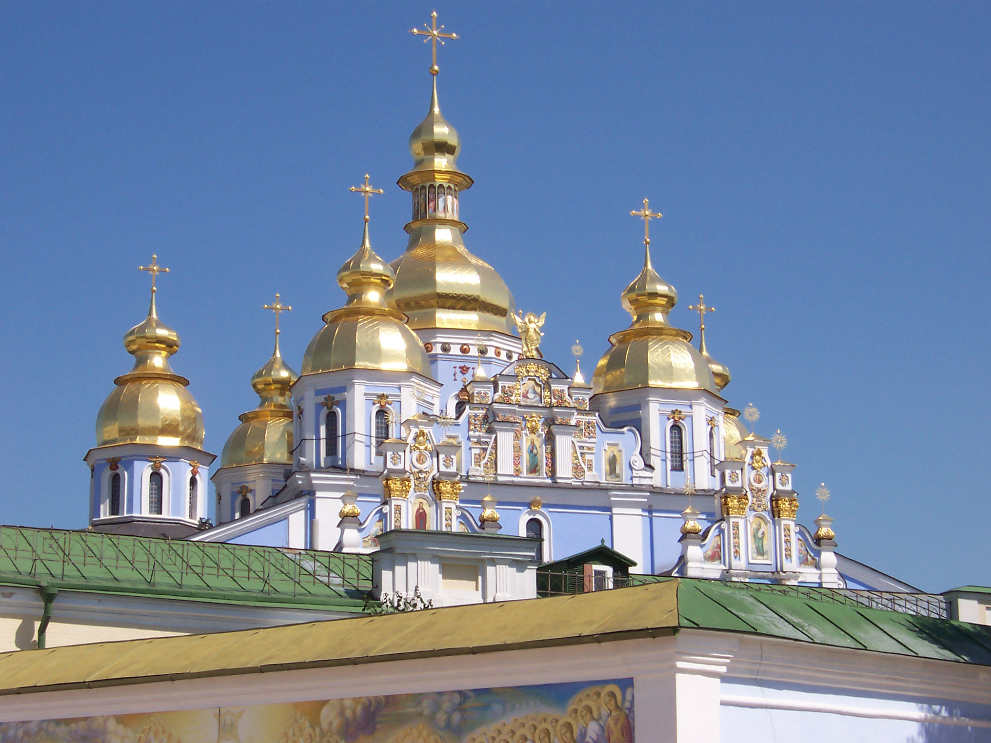 Klosterkirche St. Michael mit den goldenen Kuppeln (12. Jh.), Kiev, Ukraine